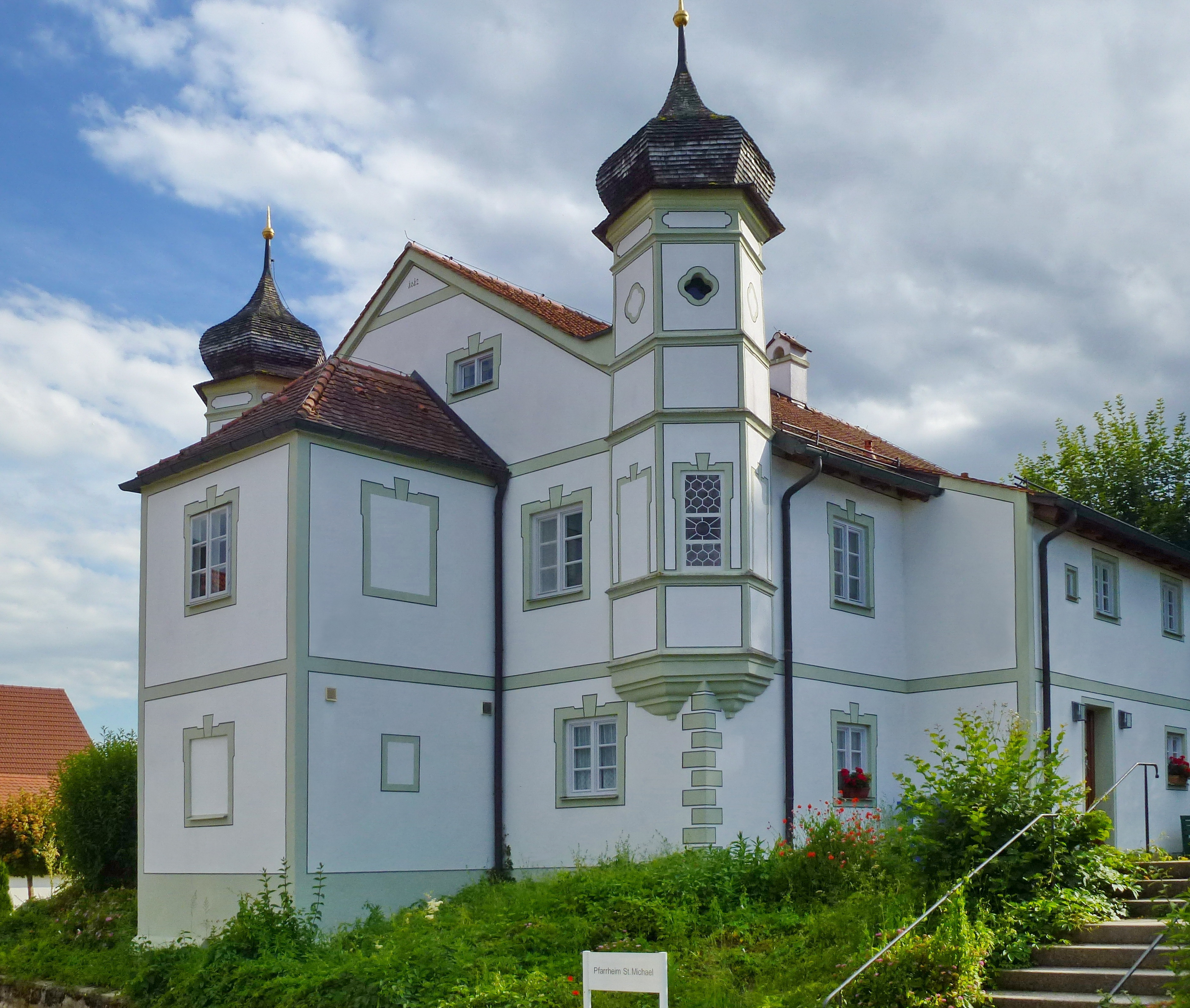 Pfafenhofen a.d. Glonn, Pfarrstr. 5: Ehemaliges Pfarrhaus. Ansicht von NO